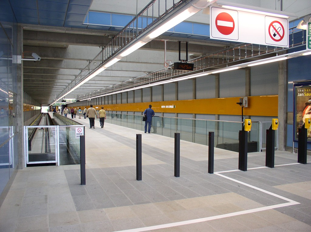 Metro station Depo Hostivař in Prague, vestible – Stanice metra Depo Hostivař, vestibul